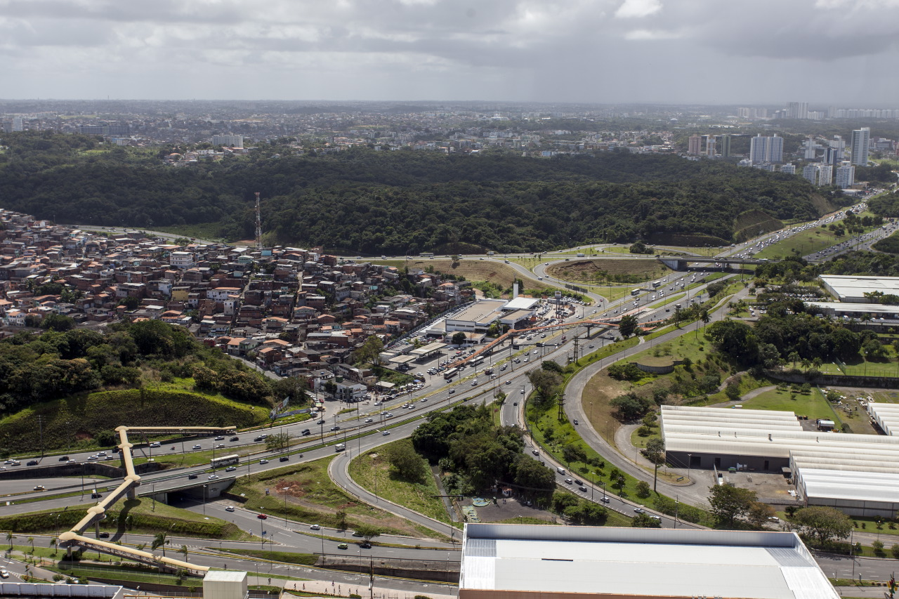 Pernambués, Avenida Paralela, Ligação Iguatemi-Paralela (LIP) e Hospital Sarah, em Salvador.